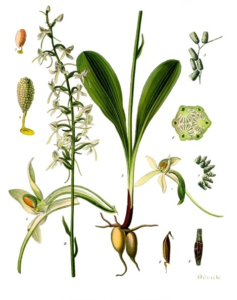 Zweiblättrige Waldhyazinthe. Platanthera bifolia Rchb. A B Pflanze in natürl. Grösse; 1 Blüthe, vergrössert; 2 dieselbe im Längsschnitt, desgl.; 3 u. 4 Polinarium mit Klebdrüse, desgl.; 5 Netzfaser mit Pollenmasse, desgl.; 6 Fruchtknoten im Querschnitt, desgl.; 7 junge Samen, desgl.; 8 Frucht, natürl. Grösse; 9 Same mit Samenhülle, vergrössert.